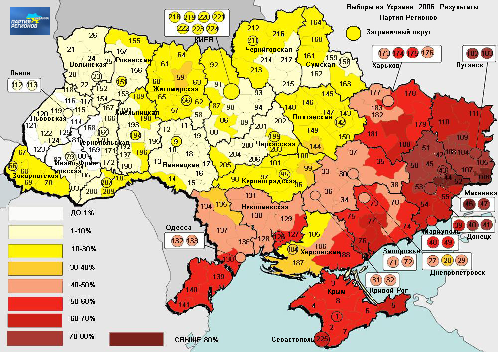 map